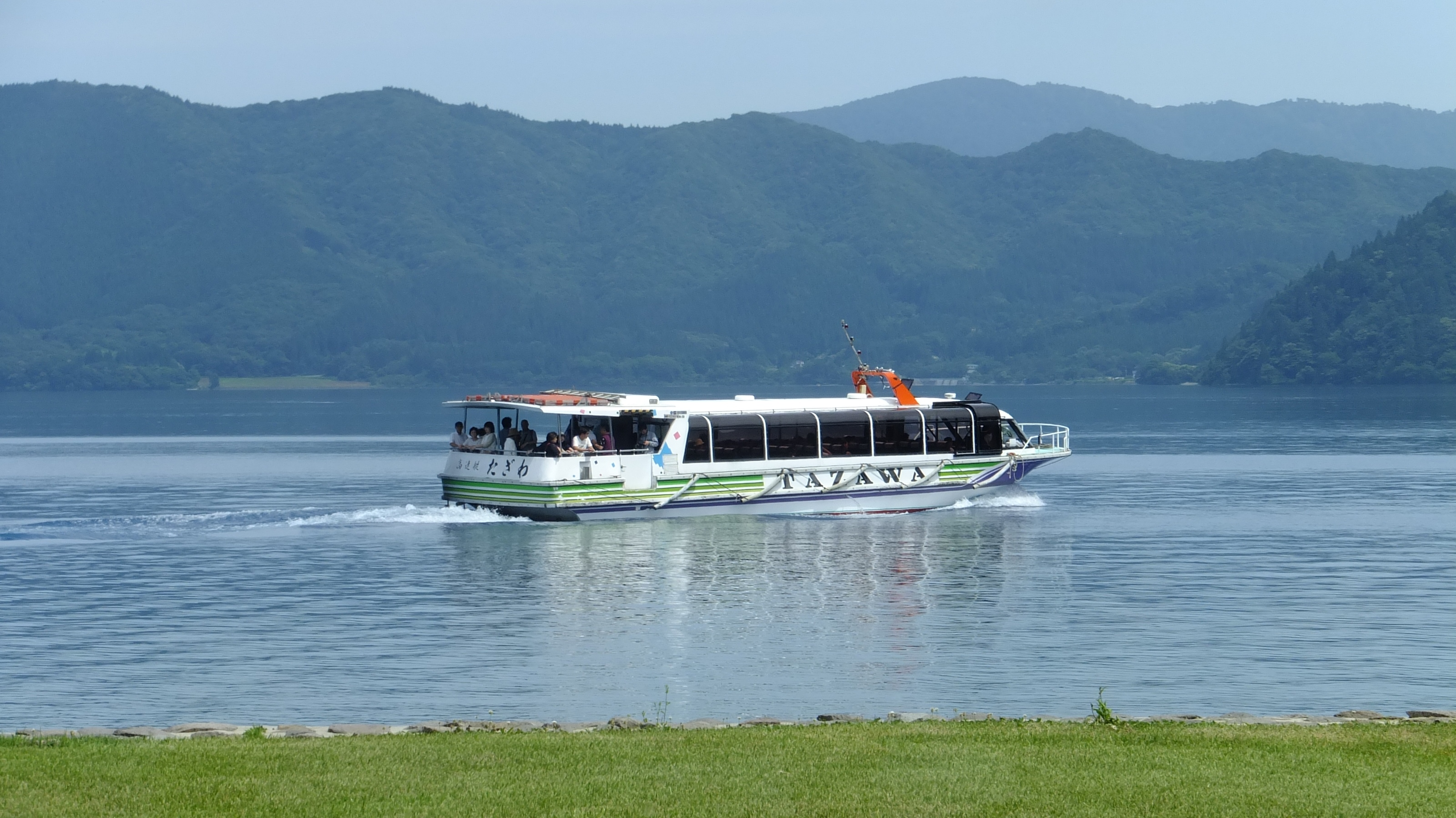 田沢湖の遊覧船「高速艇 たざわ」（秋田県仙北市）。田沢湖ローズパークホテルより